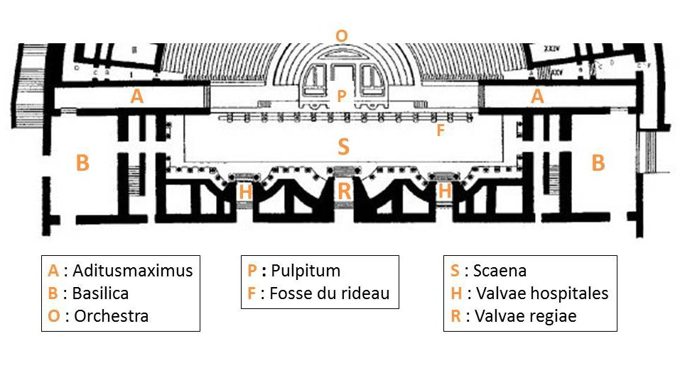 Théâtre antique de Lyon. Plan du bâtiment de scène